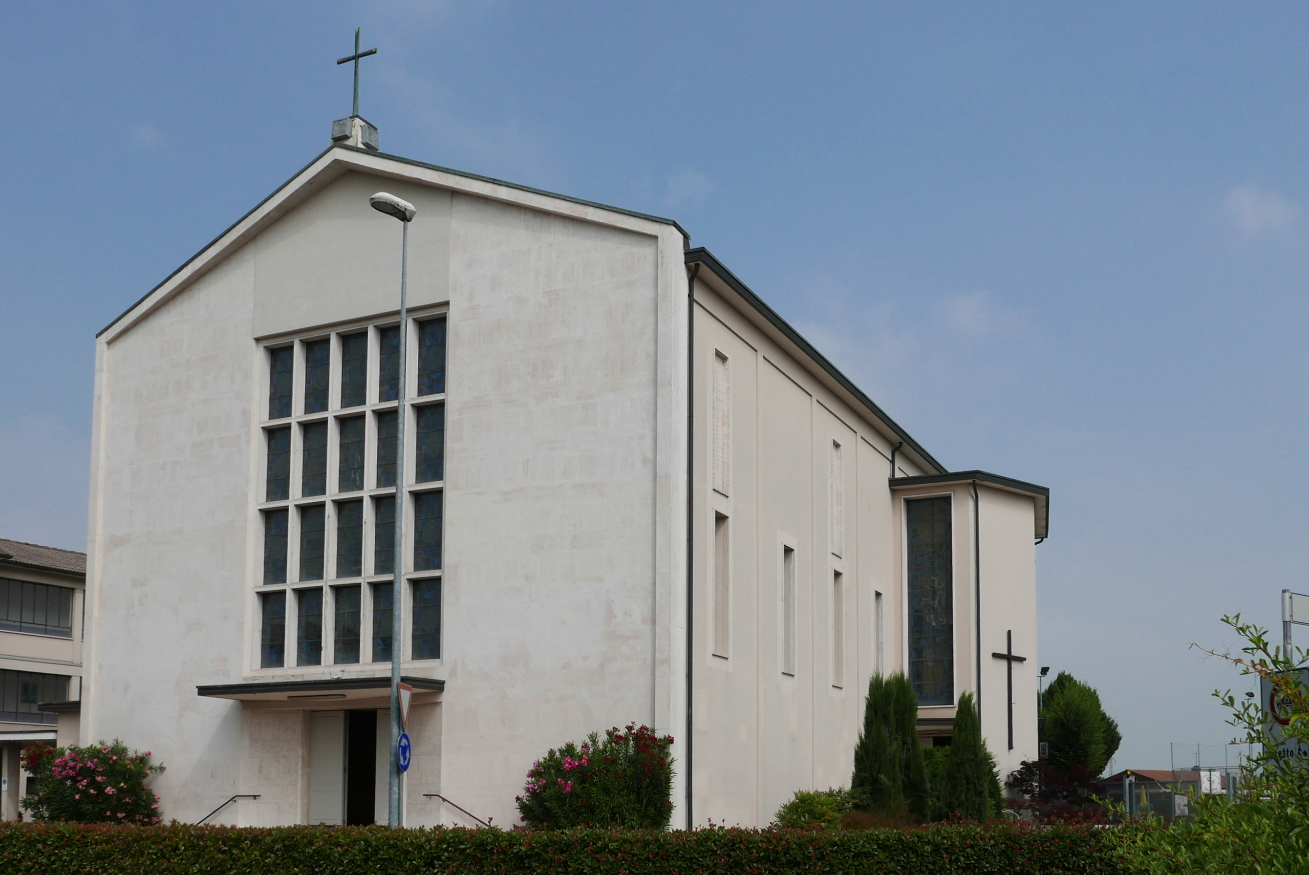 Chiesa di Santa Maria Ausiliatrice, Saviabona